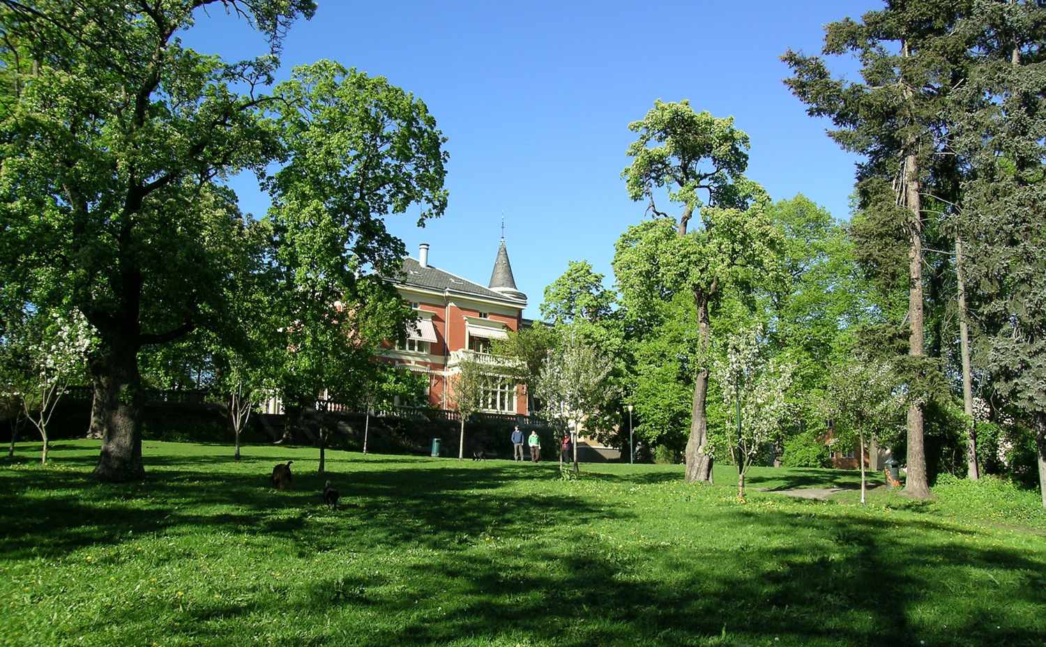 Langårdsløkken, Frogner, Oslo.